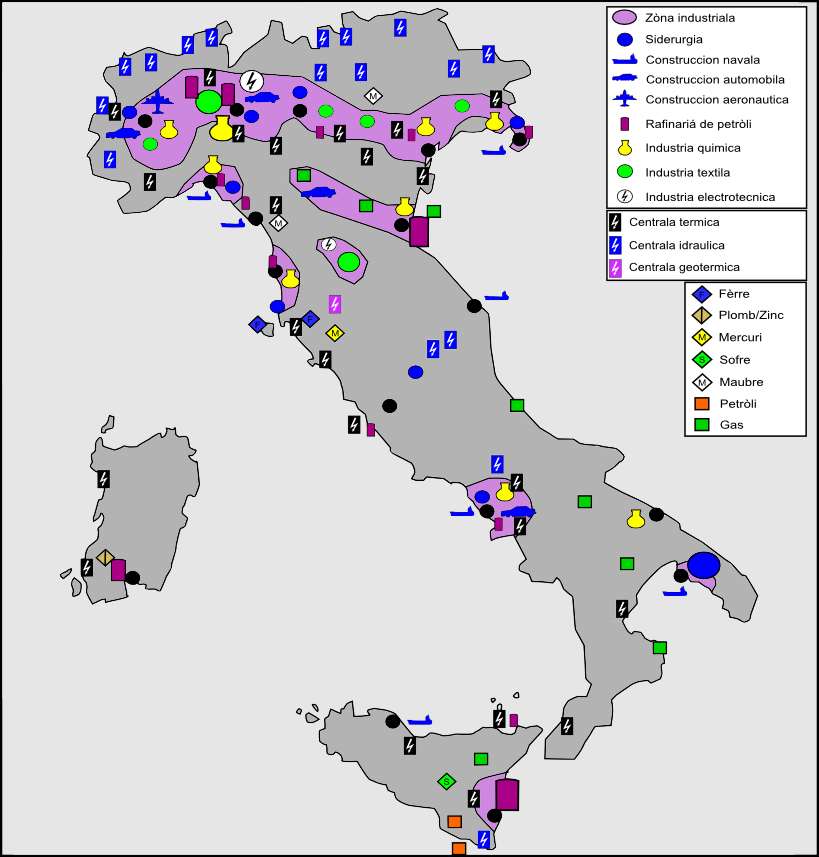 Industria, energia e ressorsas naturalas principalas d'Itàlia.